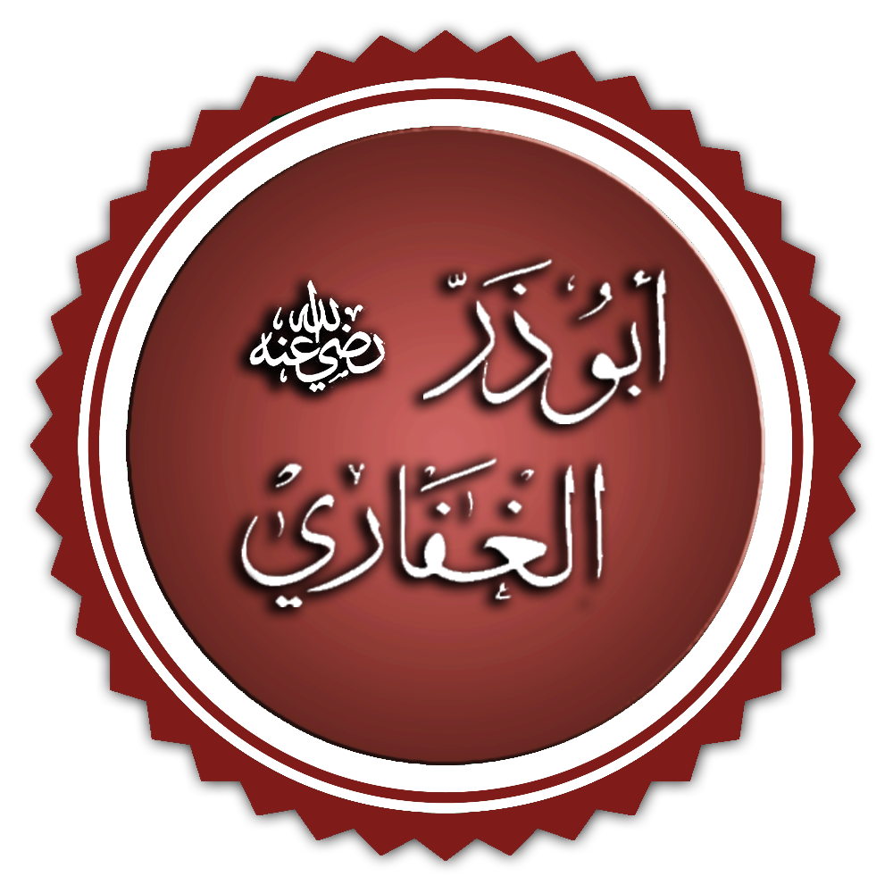 تخطيط اسم أبو ذر الغفاري رضي الله عنه